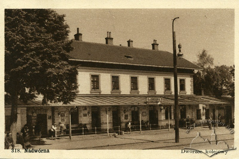 Залізничний вокзал, м. Надвірна, 1929 р. Творець: Л. і М. Геллер, Надвірна Видавець: Аба Геллер, Надвірна